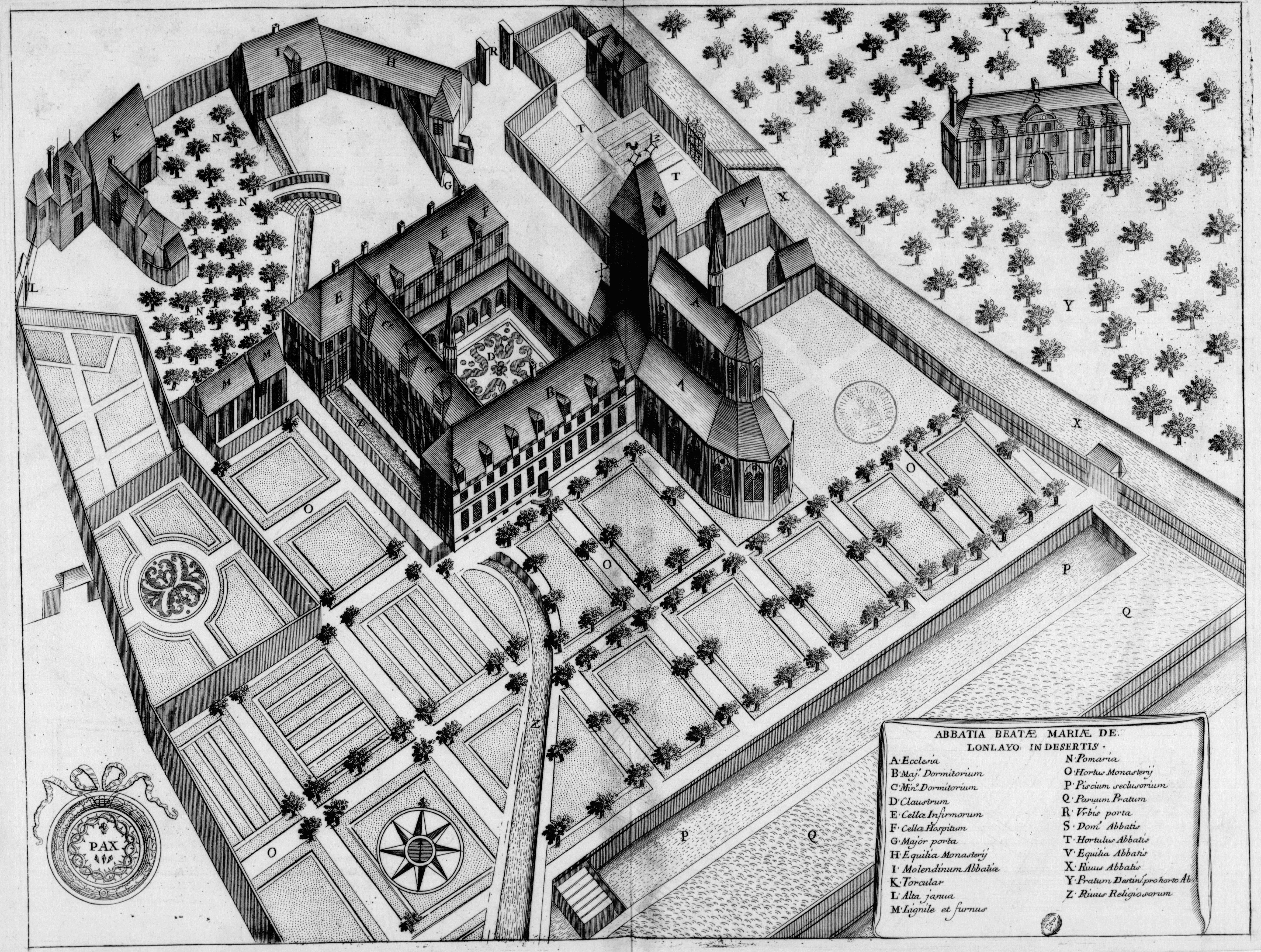 Planche gravée du 17ème siècle représentant l'abbaye Notre-Dame de Lonlay, dans le livre Monasticon Gallicanum.